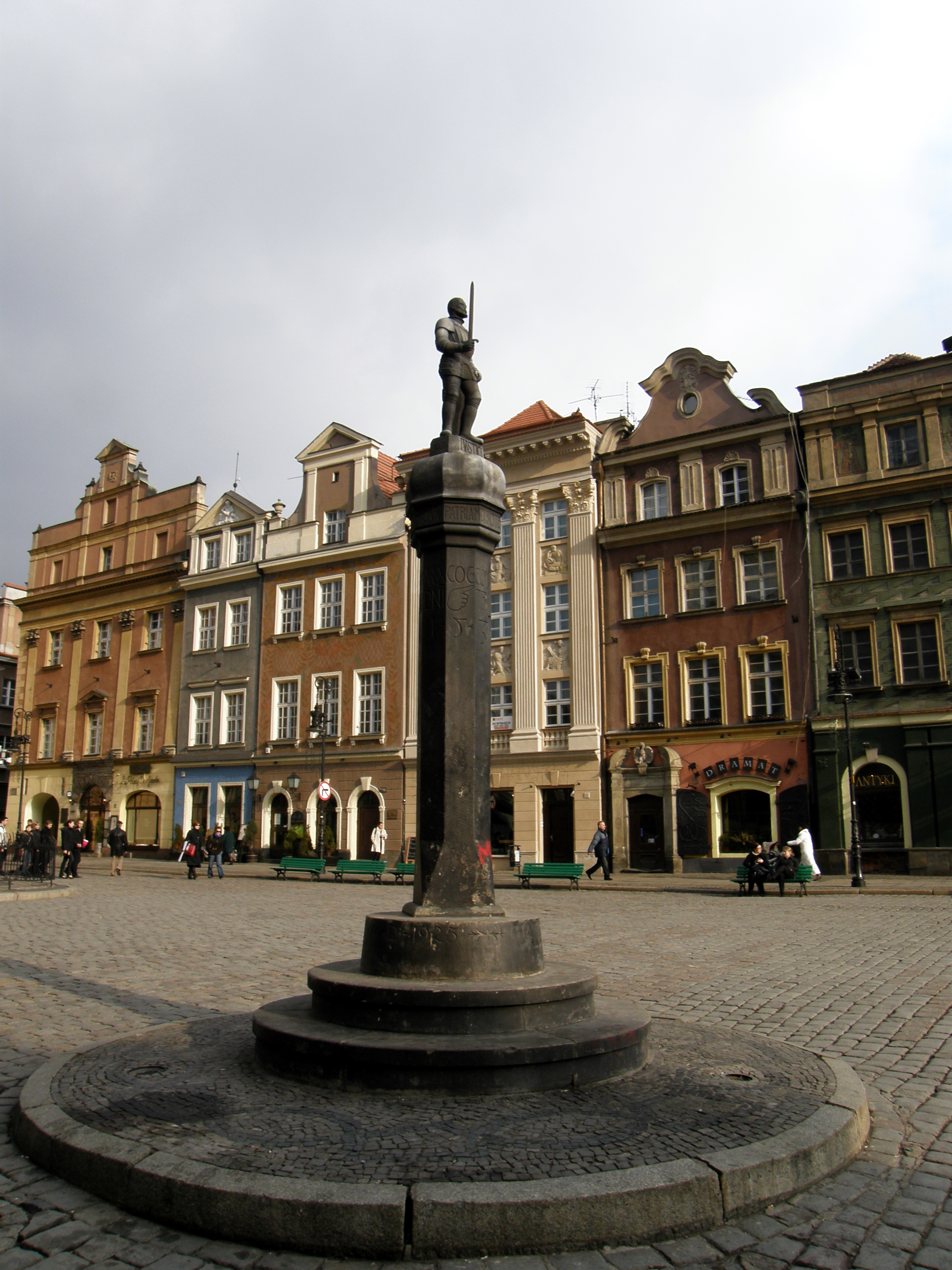 Poznań - pręgierz w zespole urbanistyczno-architektonicznym Starego Rynku